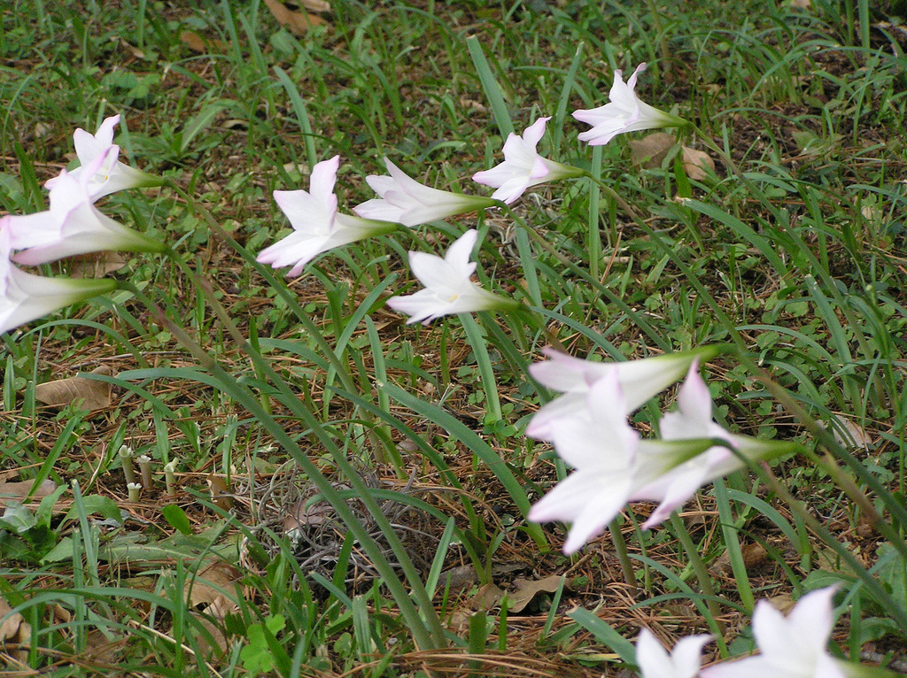 rain lilies